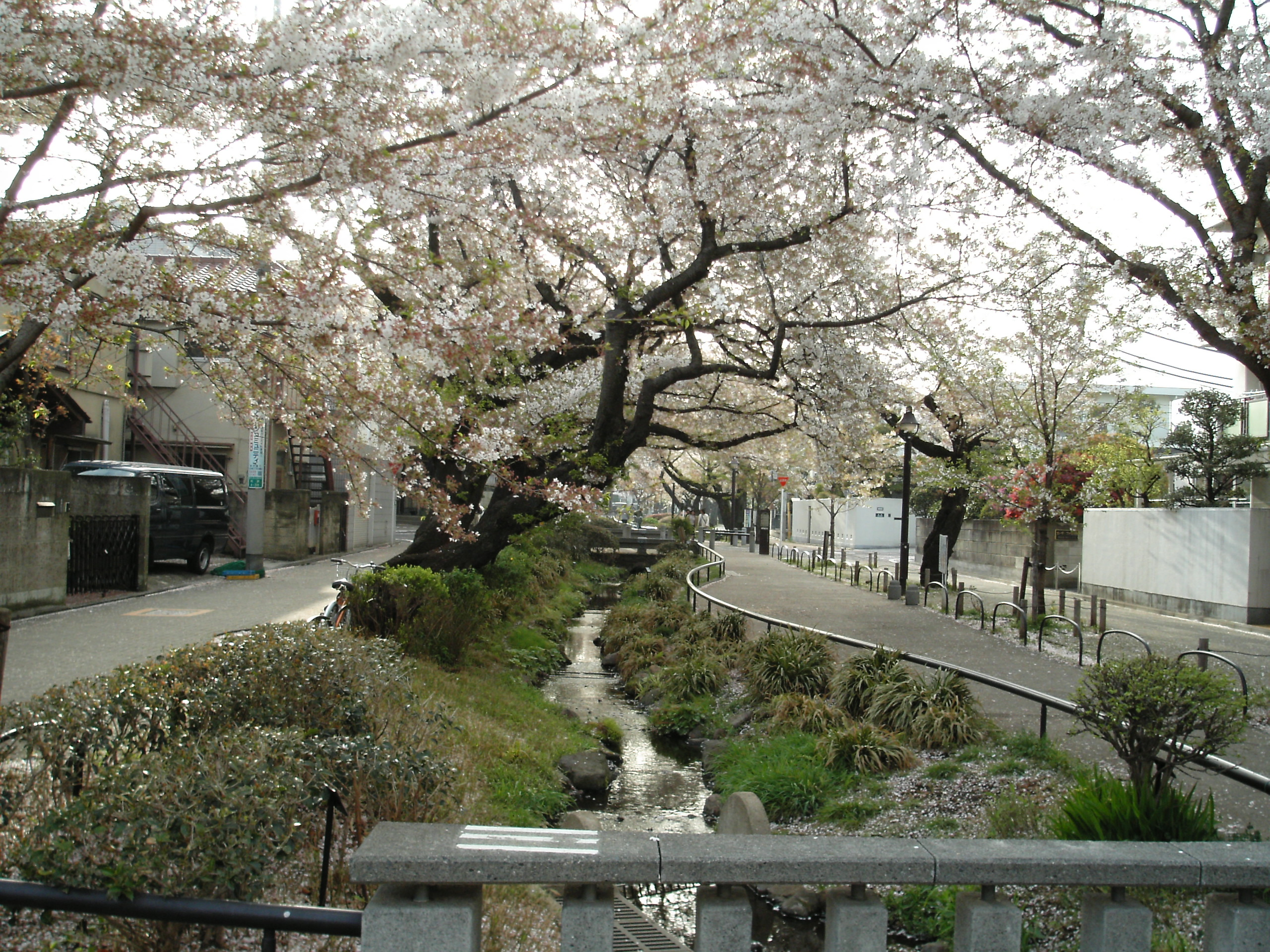 春の北沢川緑道、代沢三丁目 ※北沢川暗渠の上に作られた緑道で、せせらぎを再現している